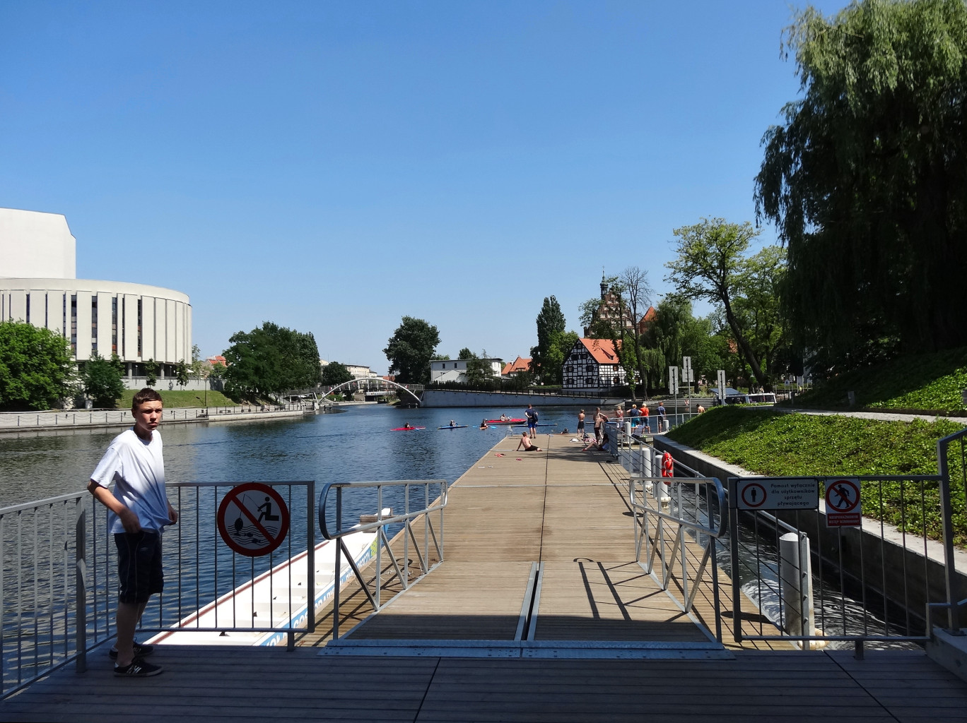 Przystań Bydgoszcz na Wyspie Młyńskiej